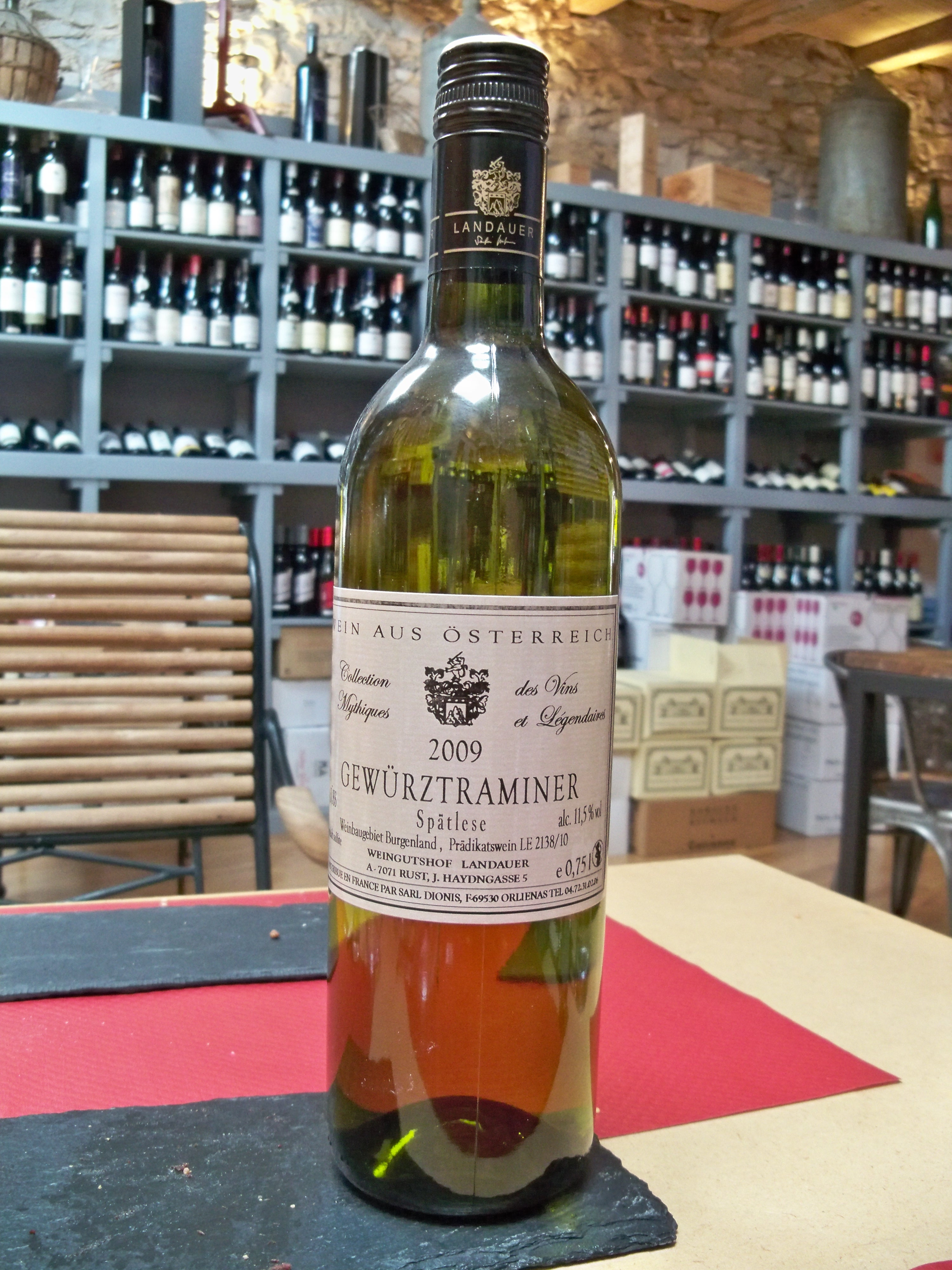 Bouteille de Gewurtztraminer d'Autriche